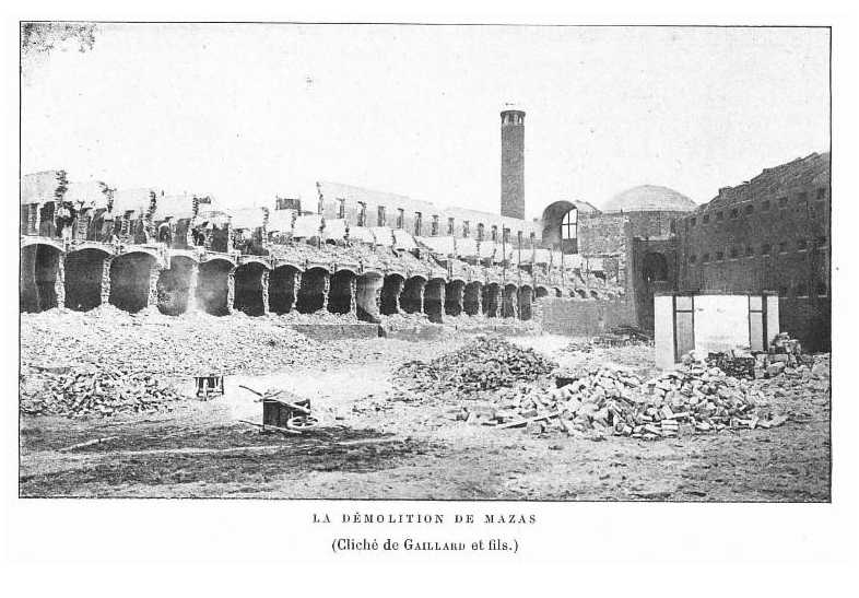 Démolition de la prison Mazas